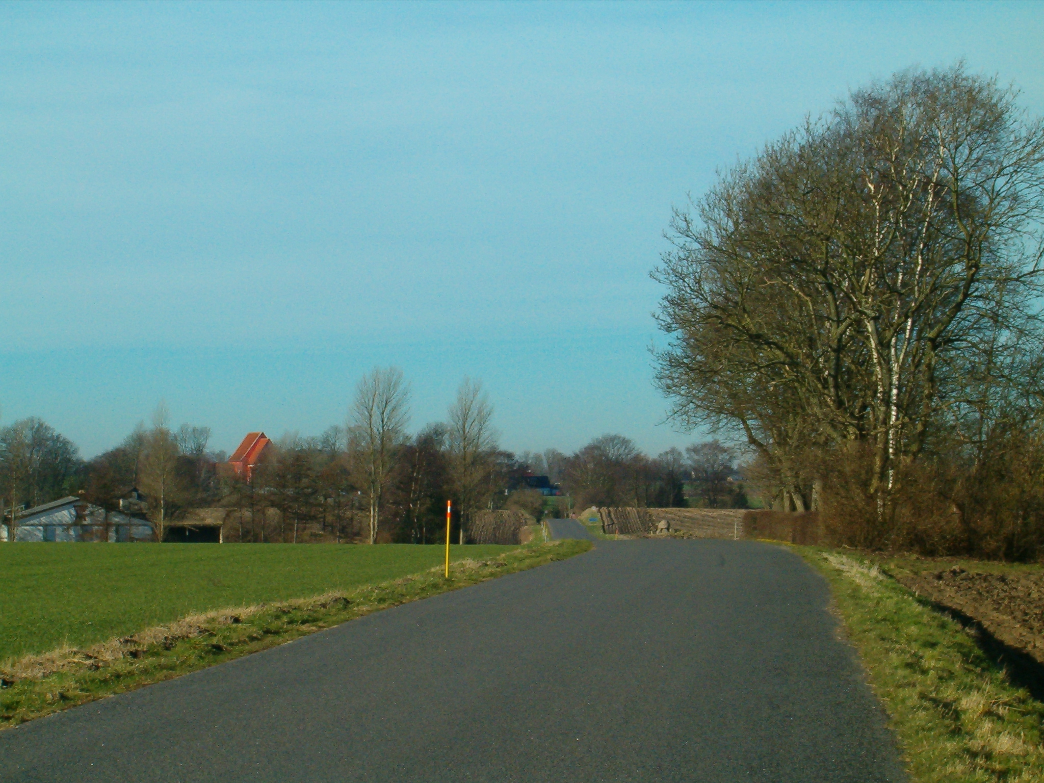 Bregninge Kirke (Guldborgsund Kommune februar 2008)